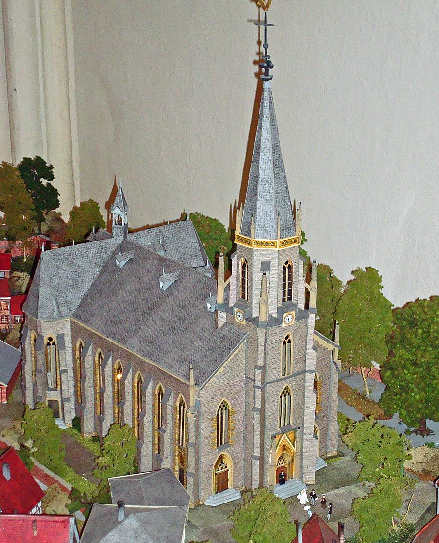 Martin-Luther-Kirche Gütersloh; Teil eines Dioramas in der Kirche, das die Szenerie rund um die Kirche um das Jahr 1900 zeigt